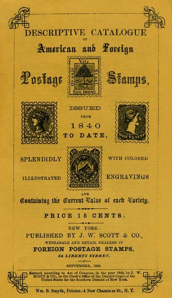 Briefmarkenkatalog 1868 Quelle: Bild aus der englischen Wikipedia (Image:Scott catalog 1868 cover.jpg)